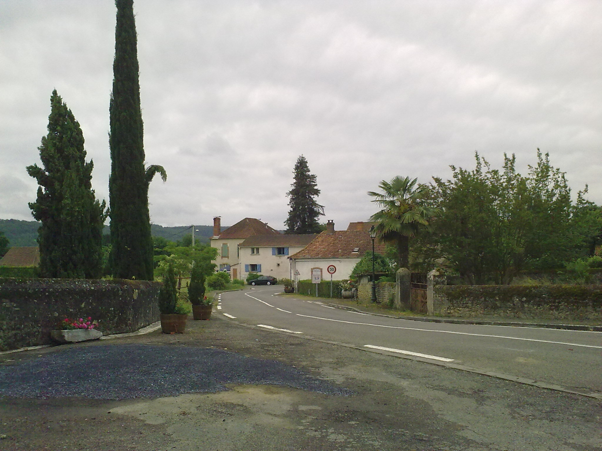 Lascazères